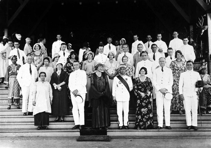 Repronegatief. Ontvangst bij de sultan van Pontianak, West-Borneo